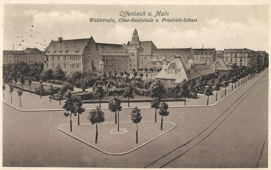 Historische Postkarte Großherzogliche Oberrealschule am Friedrichsplatz, heute Albert-Schweitzer-Schule